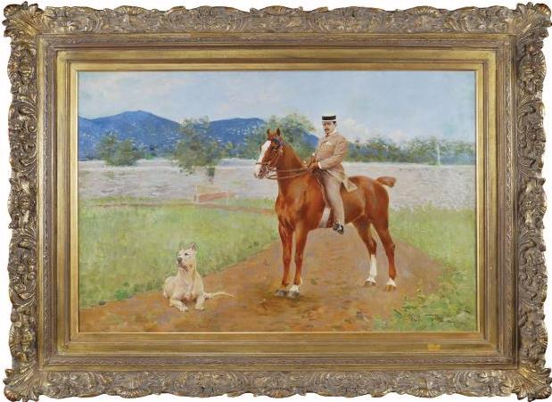 Un'immagine del maestro Puccini a cavallo nella sua proprietà affacciata sul lago di Massaciuccoli (LU).